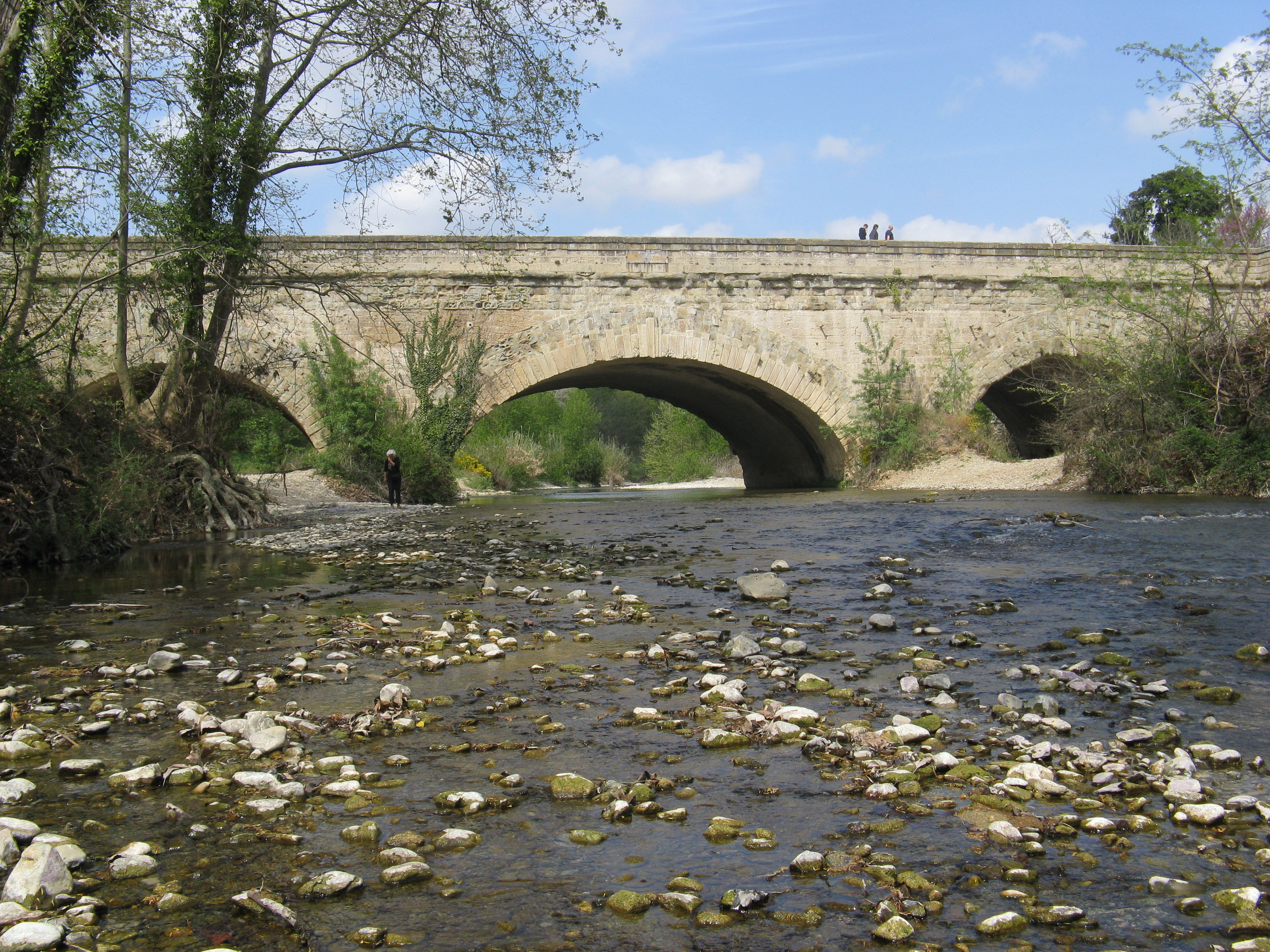 Canal du Midi: Kanalbrücke über die Cesse